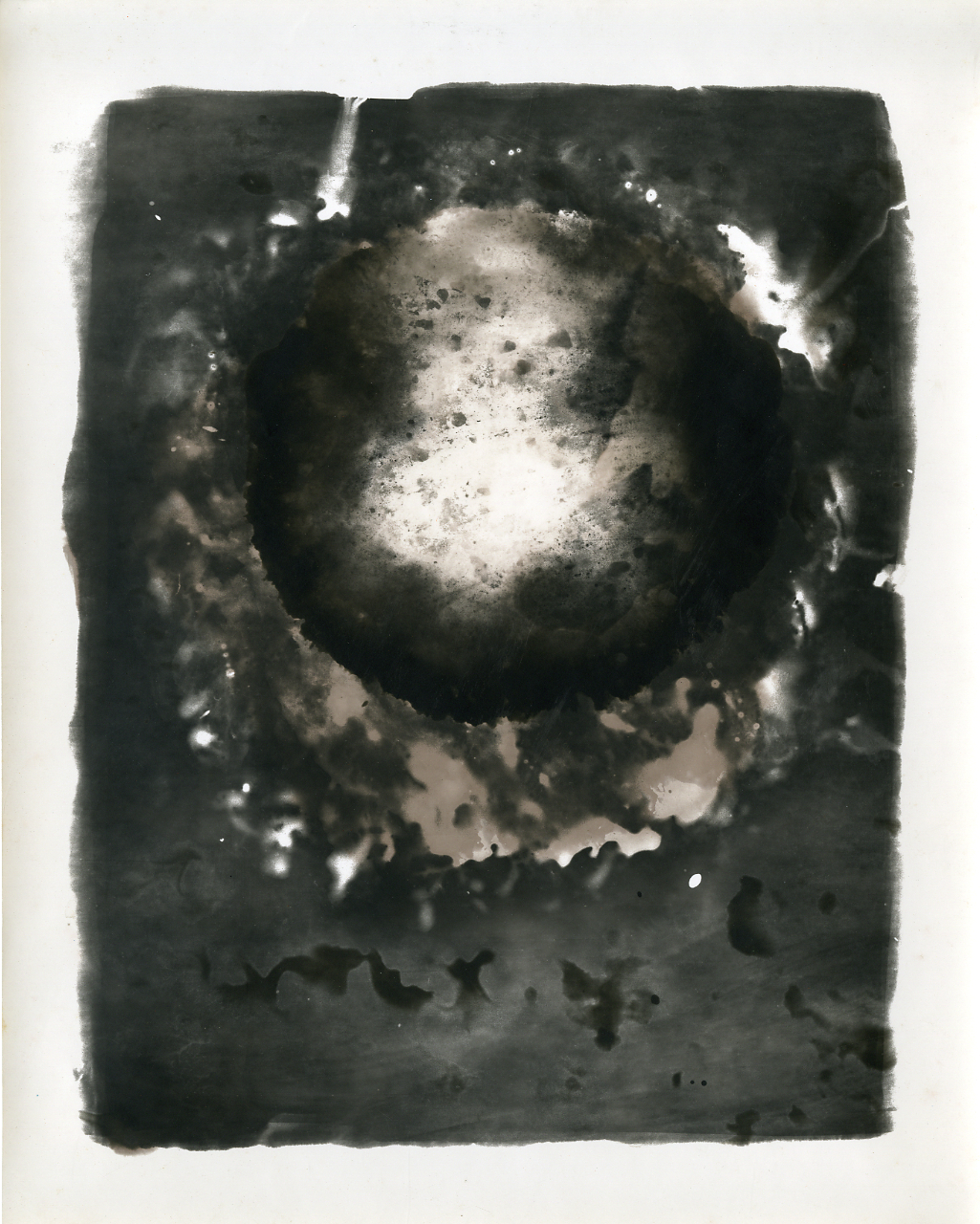 Serie fotografica : Italia, 1970 / Paolo Monti. - Stampe: 2 : Chimigramma, gelatina bromuro d'argento/ carta, 24x30. - ((Al verso di una stampa iscrizione di indicazione di responsabilità manoscritta a matita: "P. Monti". - Sul coperchio della scatola iscrizione didascalica manoscritta a pennarello nero: "4CH".